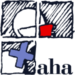 Das ehemalige Logo der Allgemeinen Homosexuellen Arbeitsgemeinschaft (AHA-Berlin e.V.). Es wurde 1991 in einem Wettbewerb an der Berliner HdK entworfen und zeigt das verschlungene Männlichkeits- und Weiblichkeitssymbol durch ein typisches Berliner Fenster betrachtet. Dieses Logo wurde 2007 durch einen neuen Entwurf ersetzt.